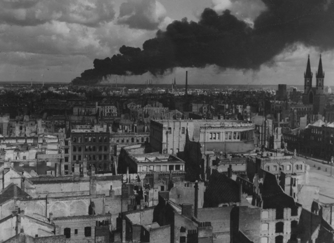 Magdeburg brennende BRABAG-Werke Januar 1945 Bild aus alter Publikation über Magdeburg